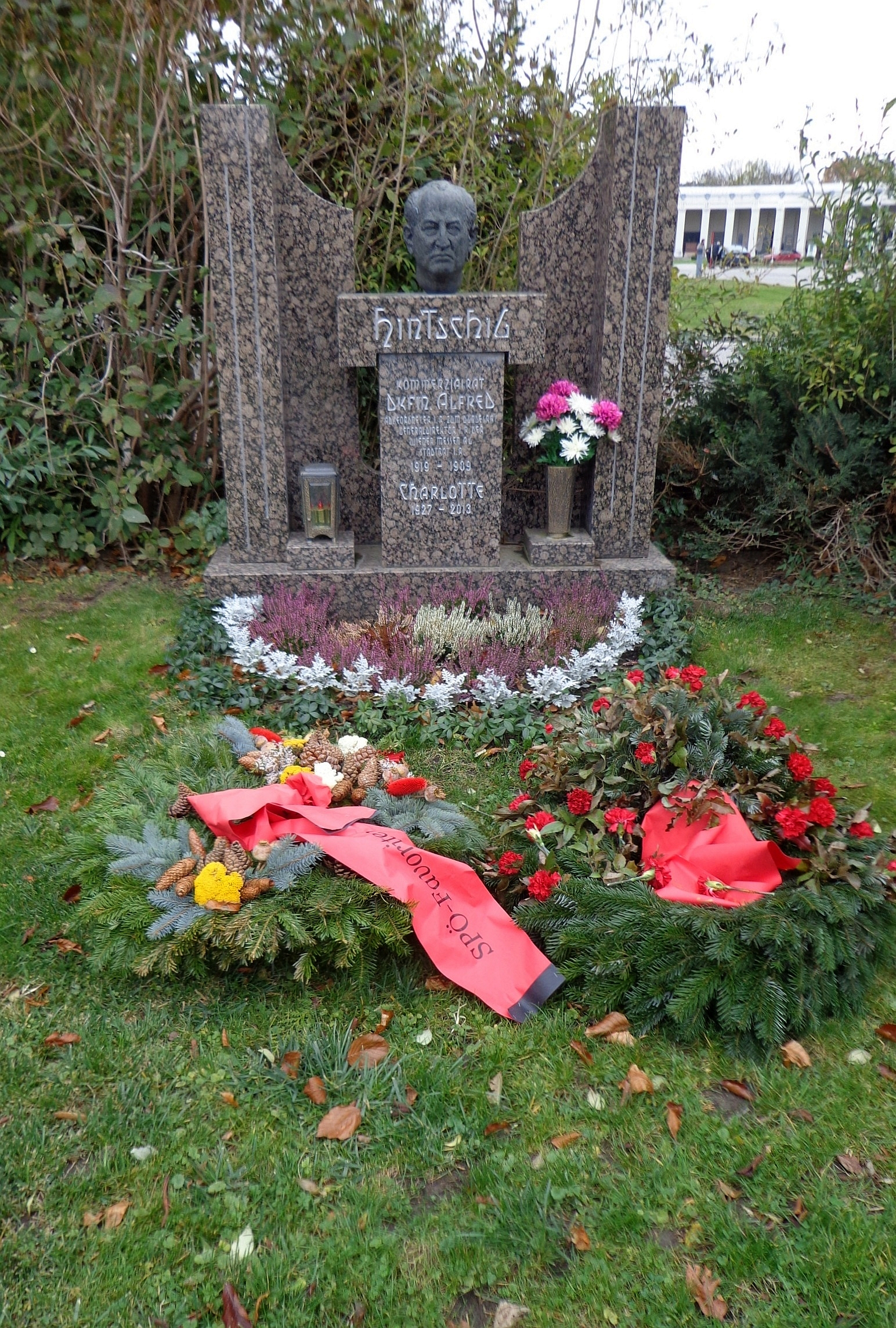 Wiener Zentralfriedhof - Gruppe 14 C, Ehrengrab von Alfred Hintschig